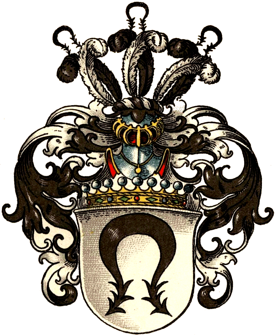 Wappen der Grafen von Loë